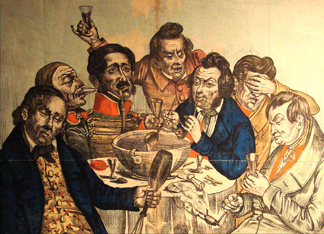 Punchelauget, ubekendt kunstner, Nationalmuséet, København